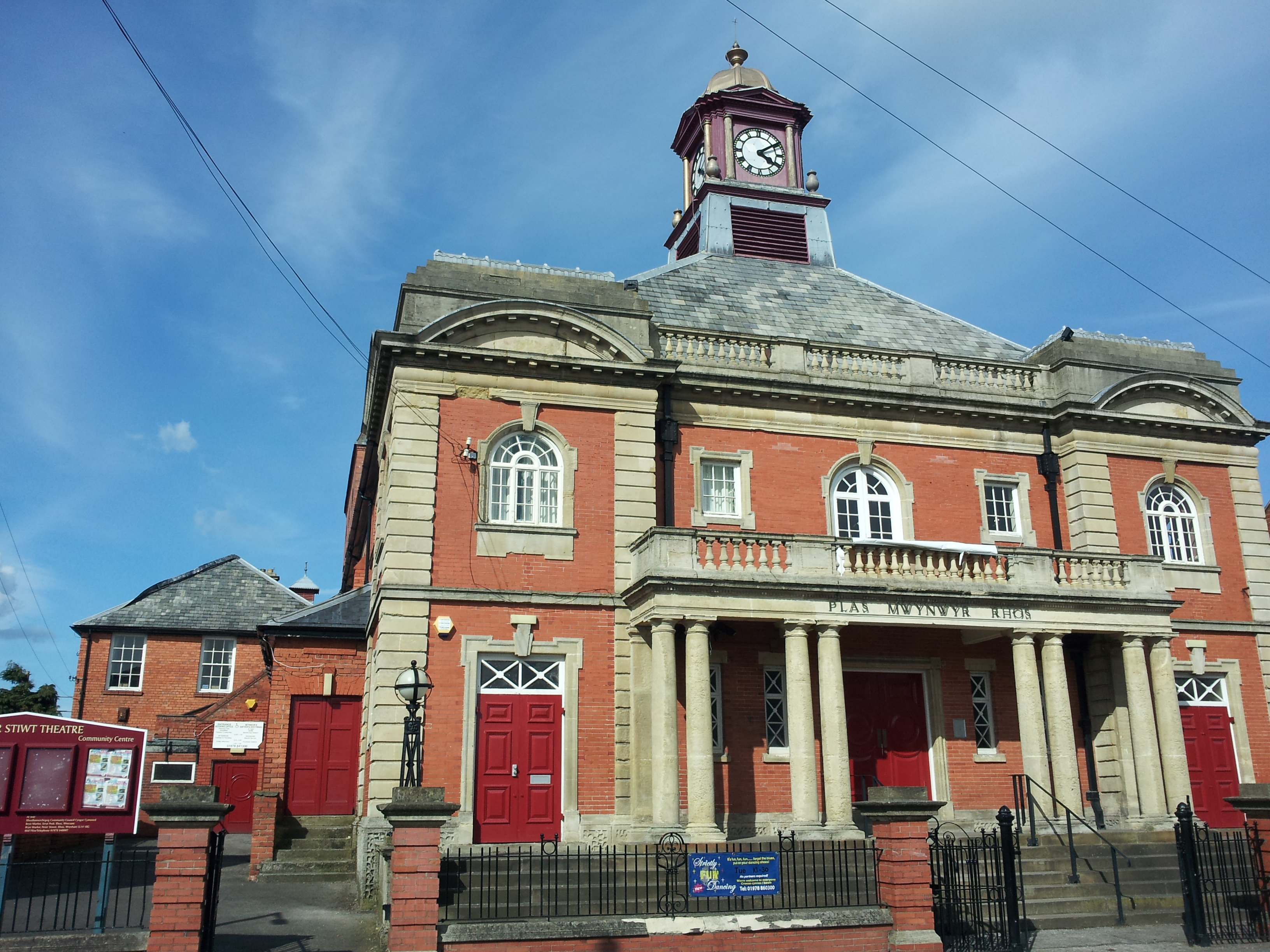 Theatr y Stiwt, Rhosllannerchrugog